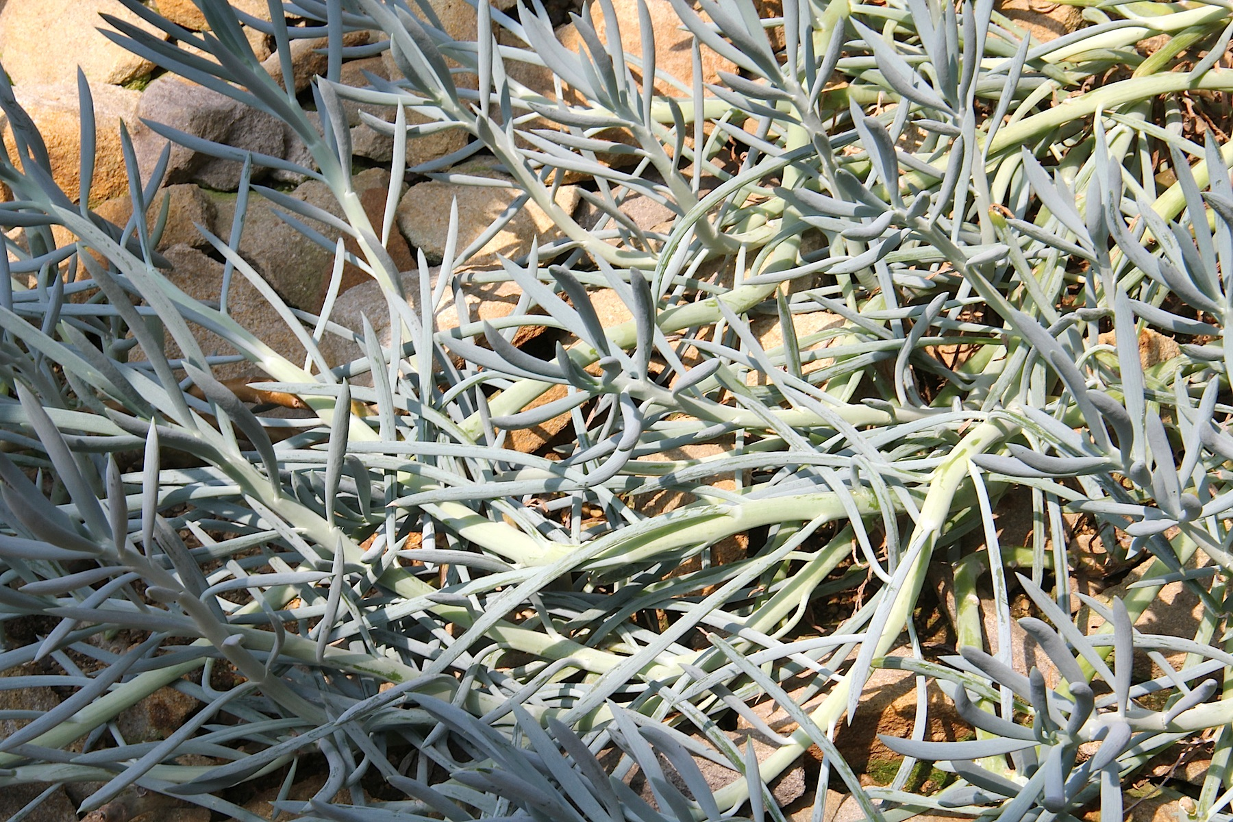 Senecio ficoides